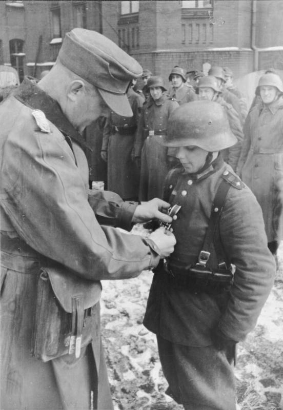 Zentralbild März 1945 II. Weltkrieg 1939-1945 Greise und Kinder sind das letzte Menschenaufgebot, daß die NS-Führung in den Kampf wirft. Der 16-jährige Hitlerjunge Willi Hübner wird nach den schweren Kämpfen um die niederschlesische Stadt Lauban mit dem Eisernen Kreuz II. Klasse ausgezeichnet. So versuchten die nationalsozialistischen Führer, Deutschlands Kinder für "Heldentaten" zu begeistern.